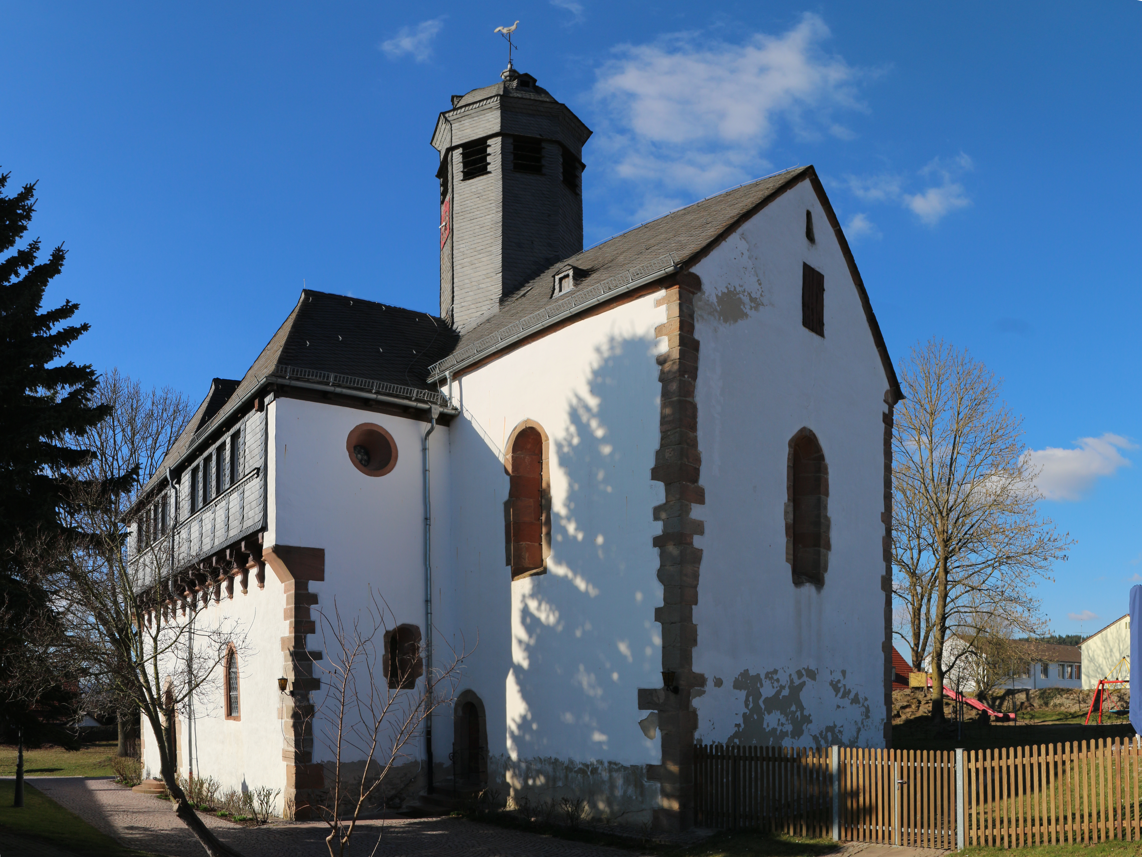 Lohra Kirche